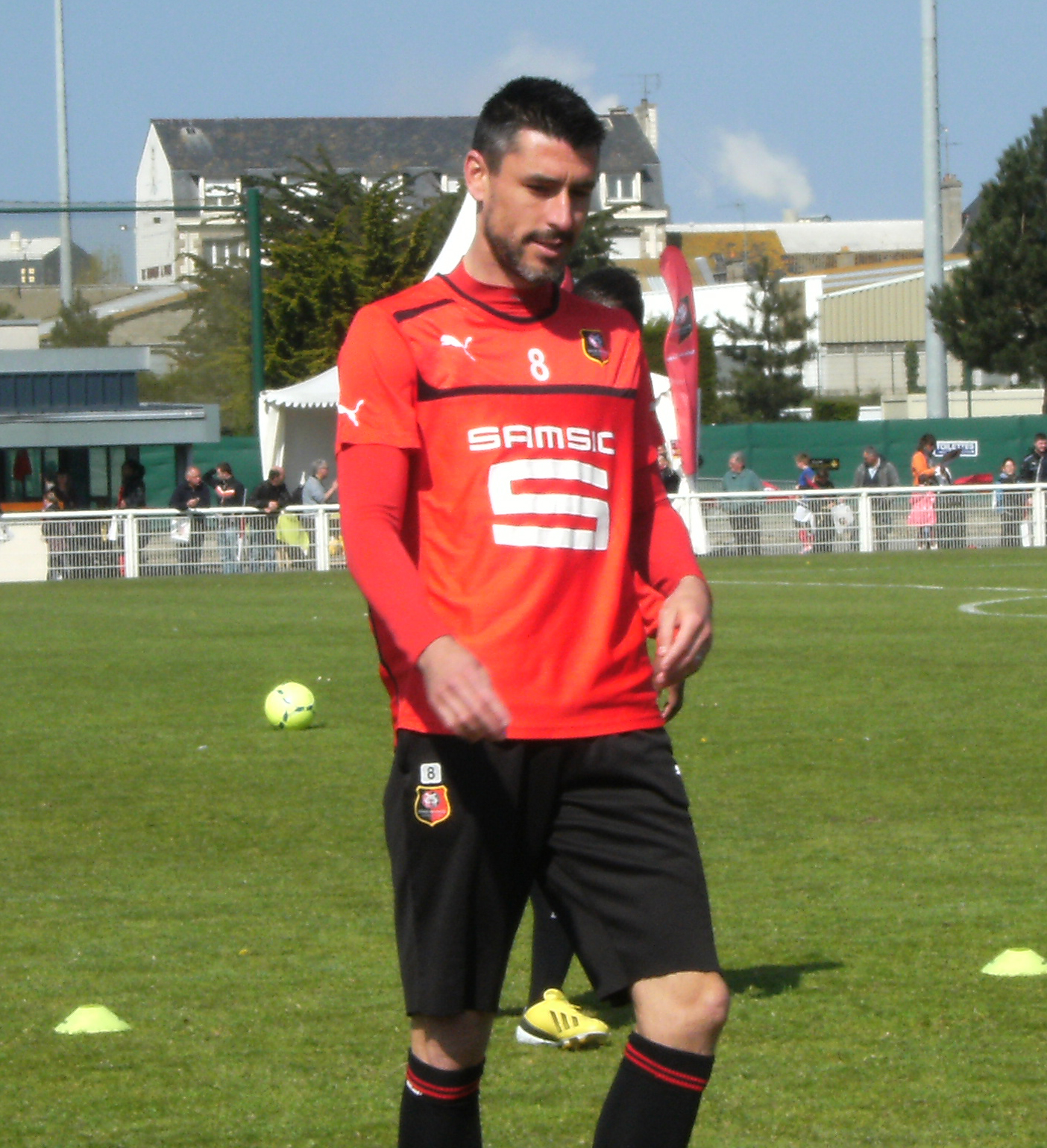 Photo prise lors d'un entraînement du Stade rennais au stade de Marville de Saint-Malo le 3 mai 2013. Ici, Julien Féret.